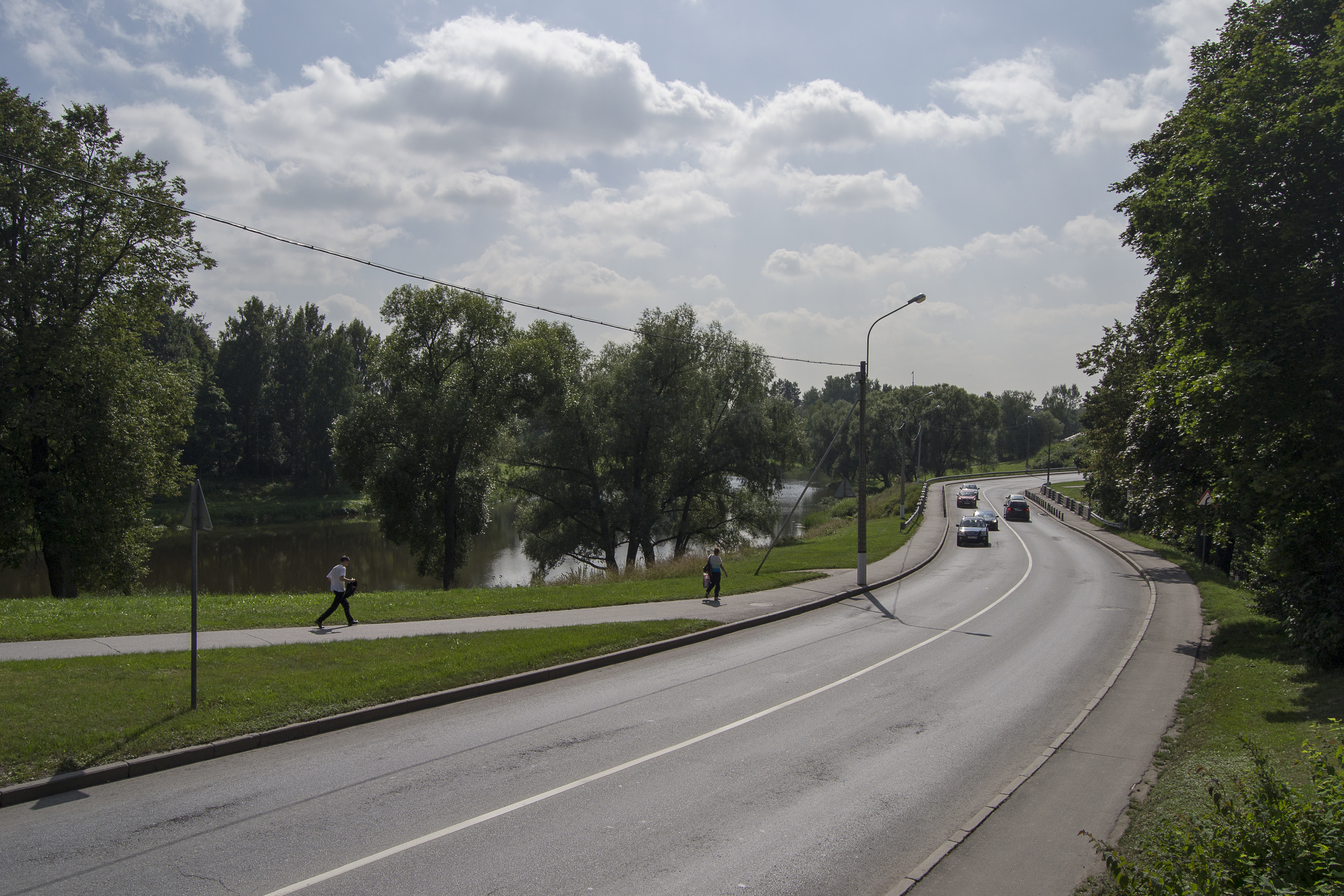 Садовая улица в Павловске